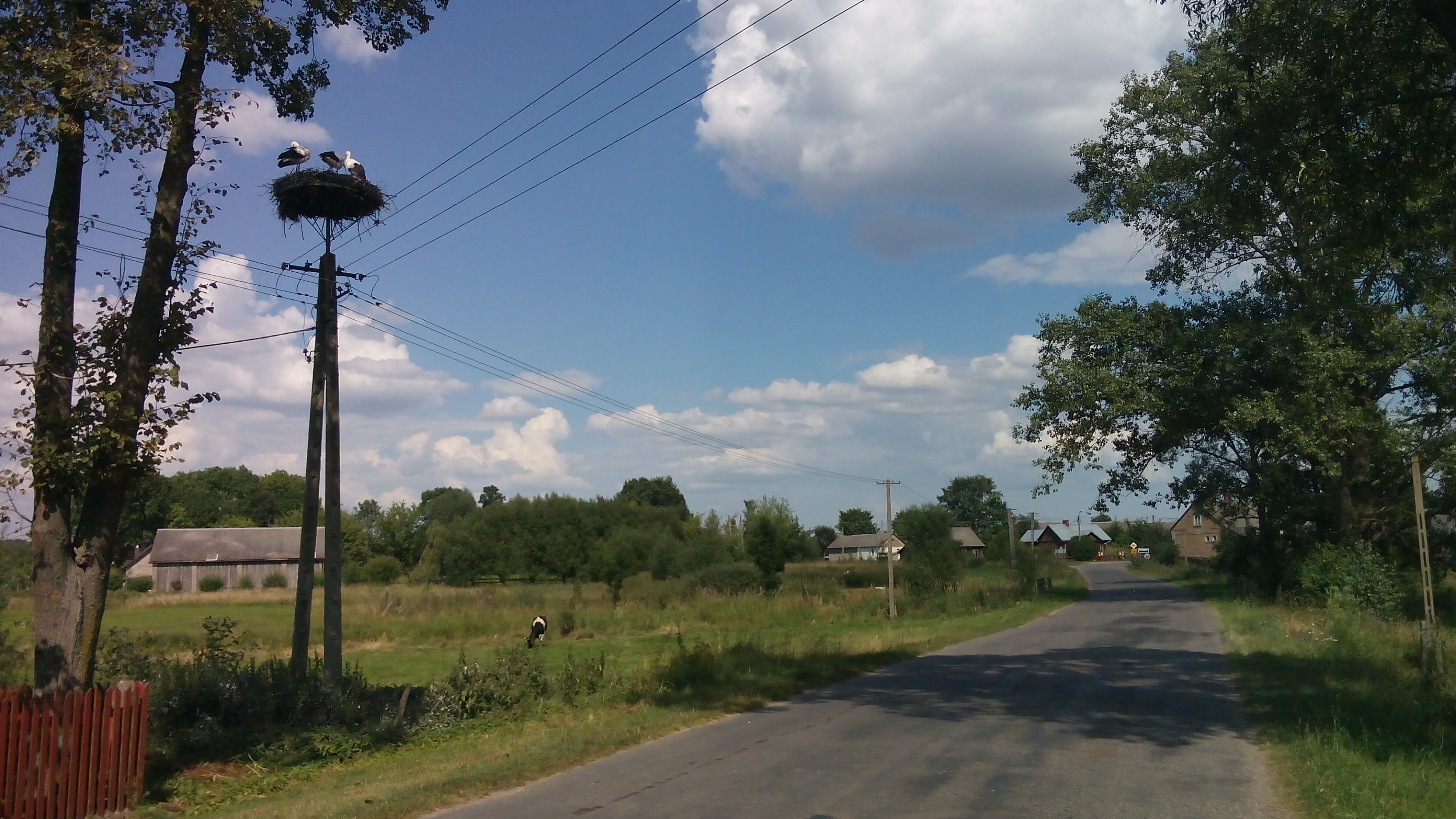 Gniazdo bociana białego znajdujące się we wsi Krasna Wieś